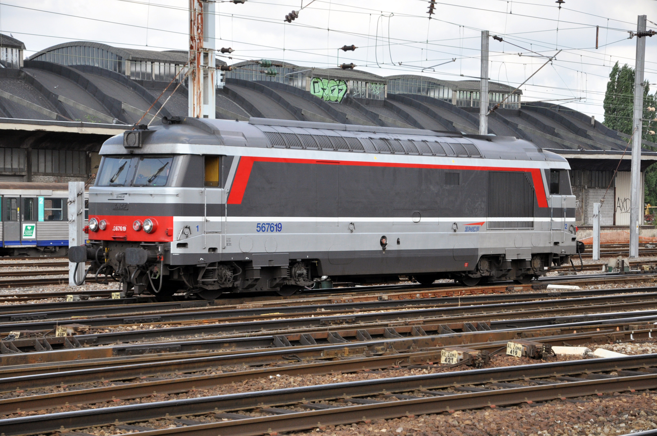 BB 67619 en manoeuvre